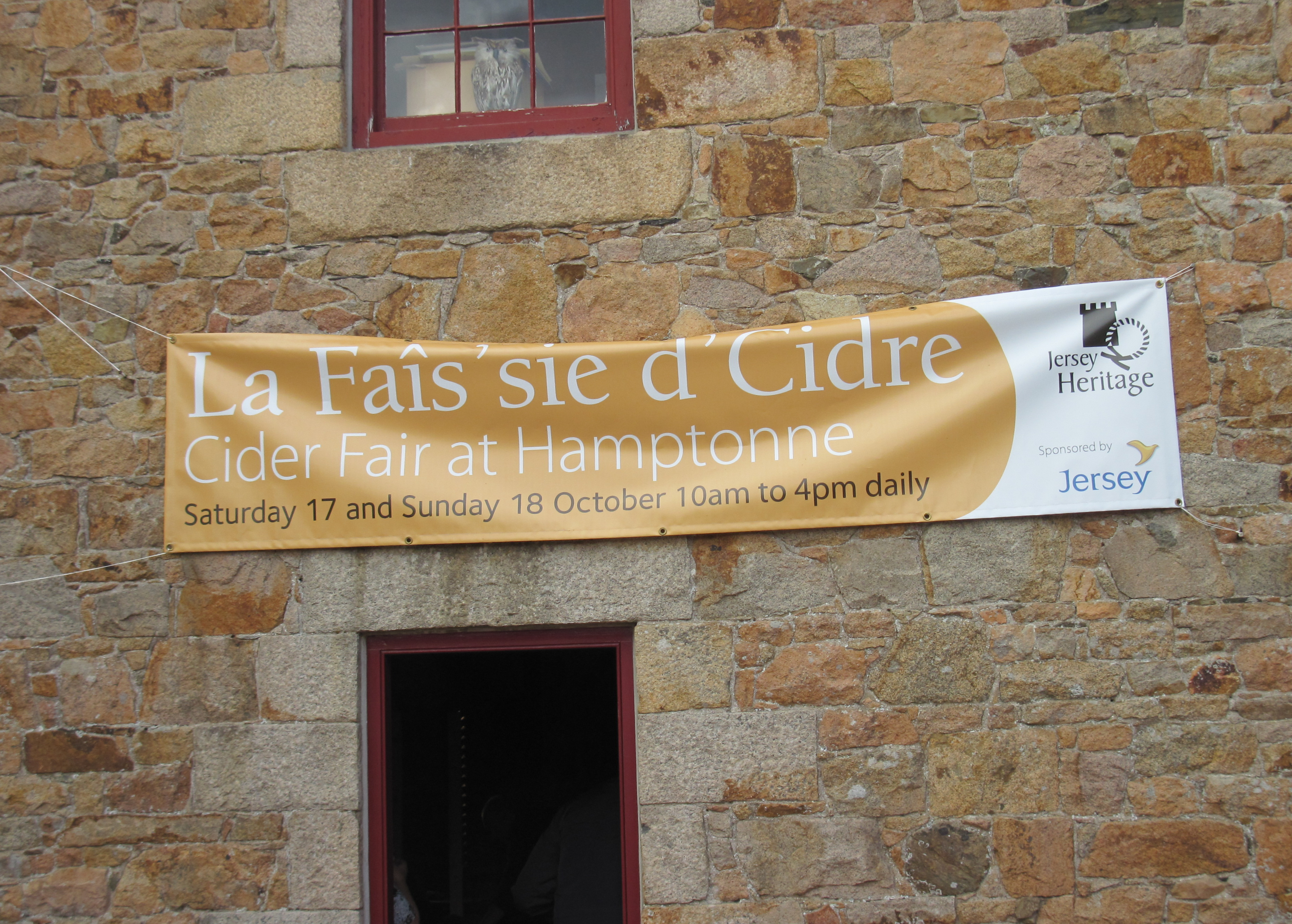 Nrf: Faîs'sie d'Cidre, 17-18 d'Octobre 2009, Jèrri